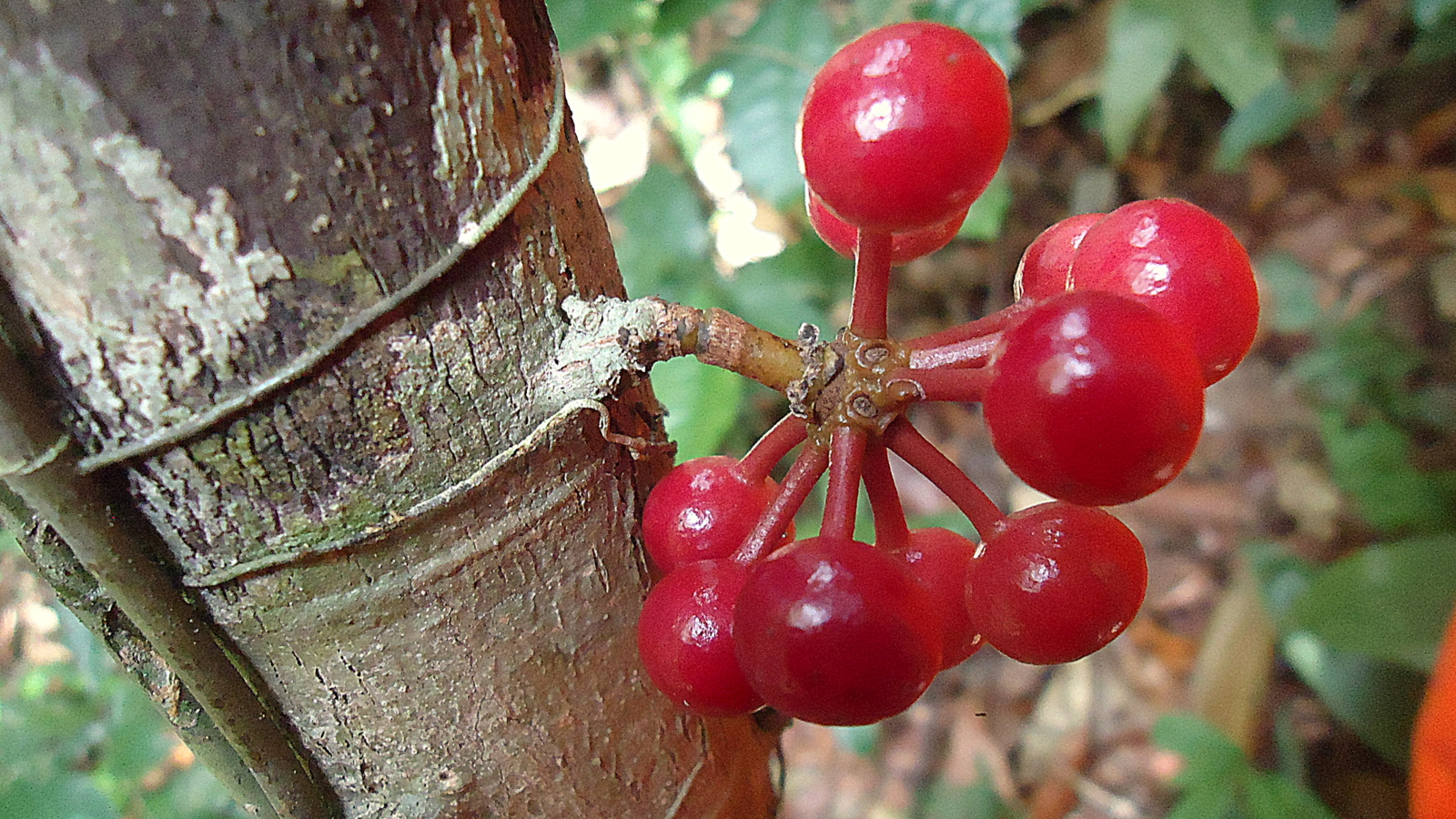 Pseudoxandra bahiensis Maas & Westra